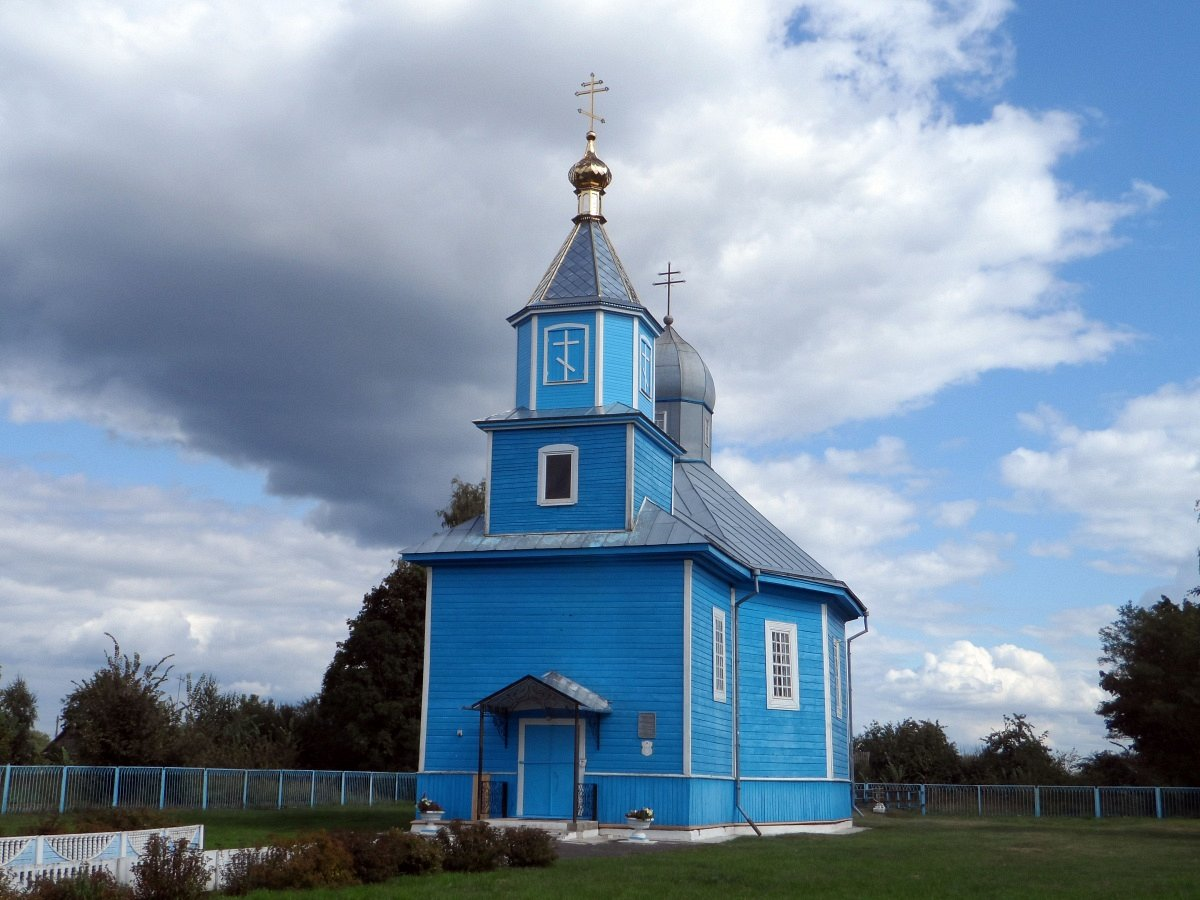 Лунін. Царква